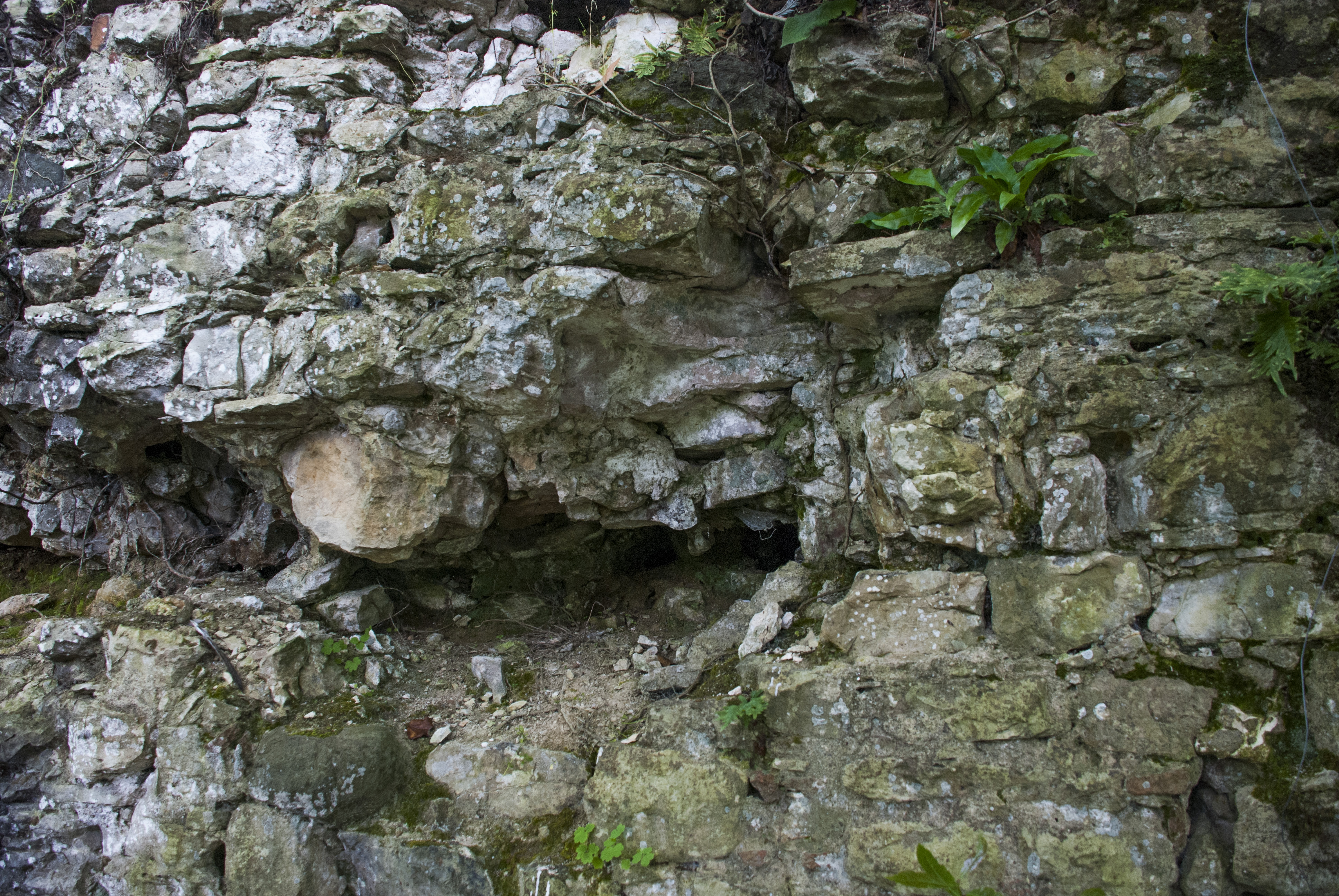 Karasu Kalesi detay.